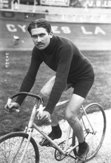 Portrait d'Henri Pélissier sur son vélo en 1913.